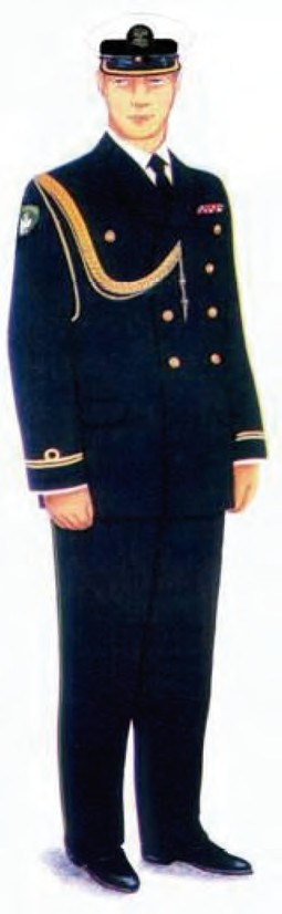 Ubiór galowy funkcjonariuszy noszących umundurowanie Marynarki Wojennej z mundurem wyjściowym noszonym ze sznurem galowym oraz z czapką garnizonową.